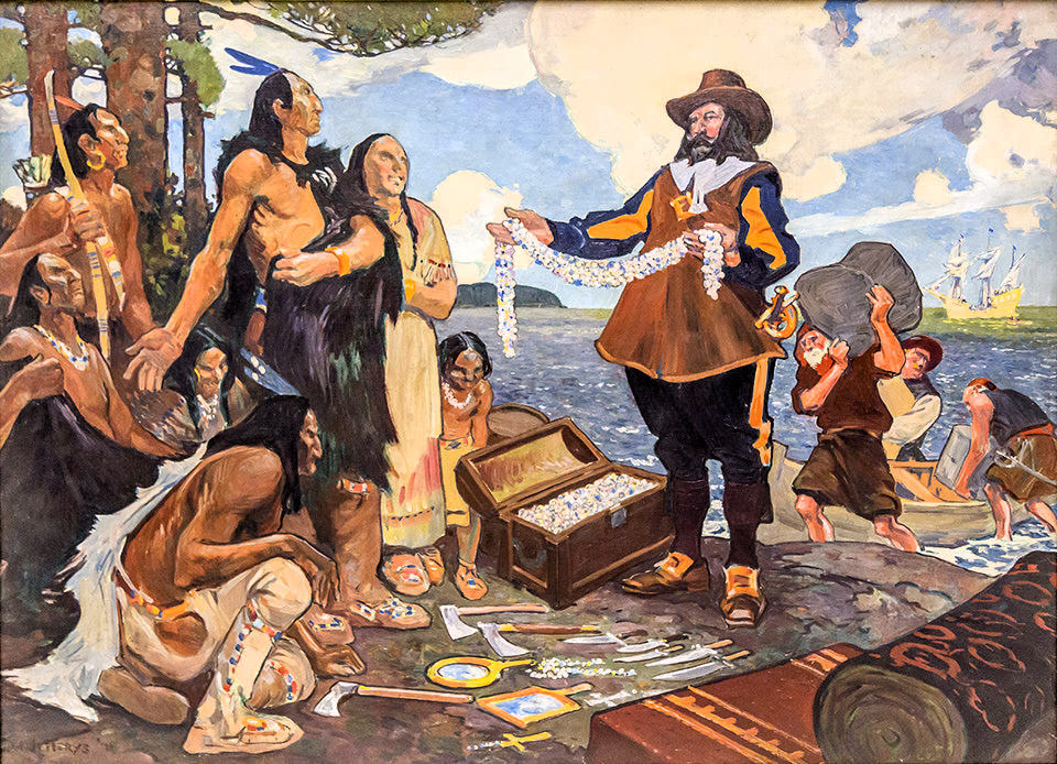 Champlain qui échange avec les Indiens, 1911 Charles William Jefferys Bibliothèque et Archives Canada C-103059